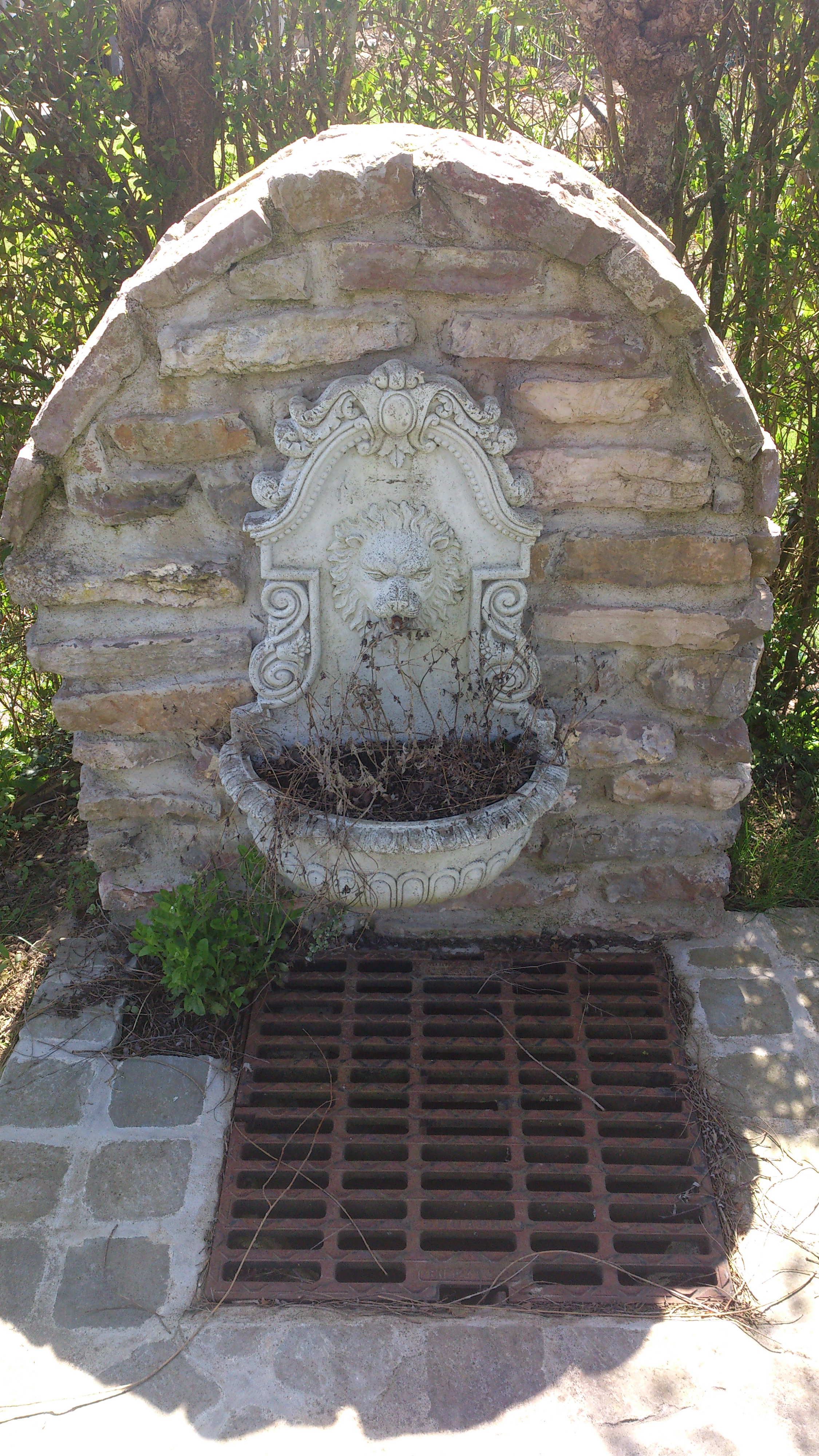 Voici la source miraculeuse l'eau se transformerait en vin.